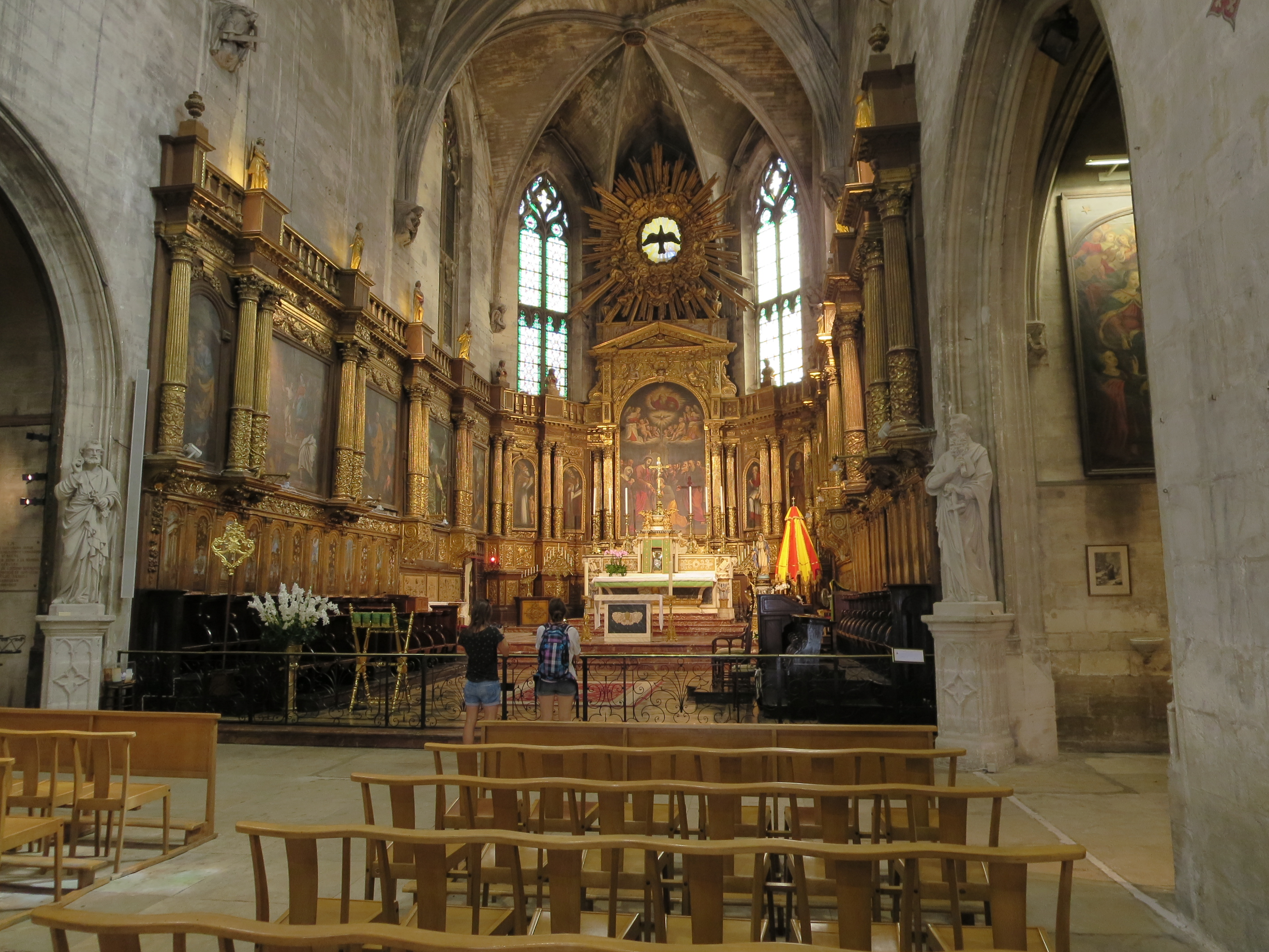 Avignon, Saint Pierre, Chor